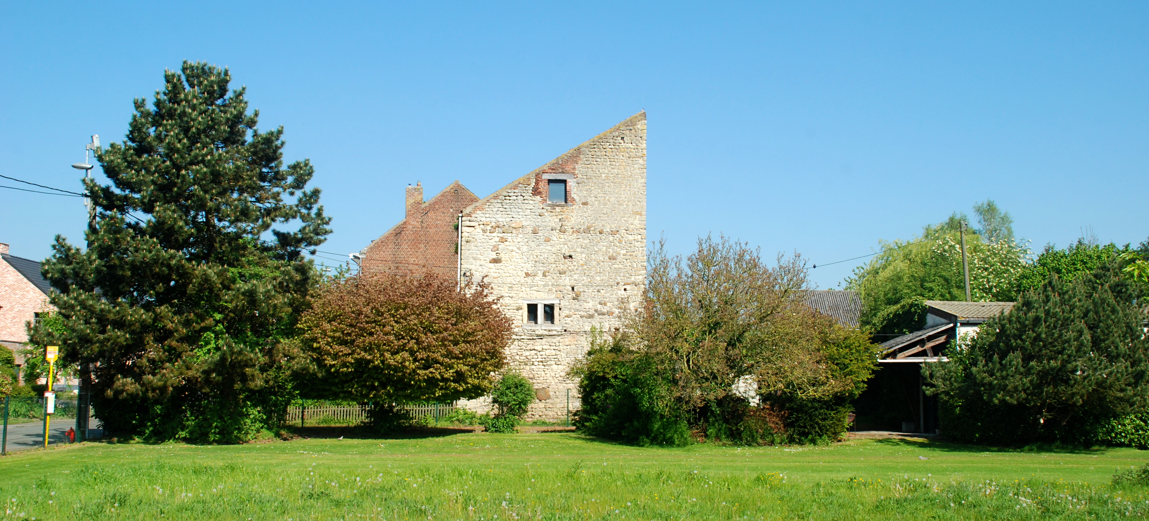 Belgique - Brabant wallon - Mont-Saint-Guibert - Corbais - Tour Griffon du Bois (donjon de Corbais, 13e siècle)